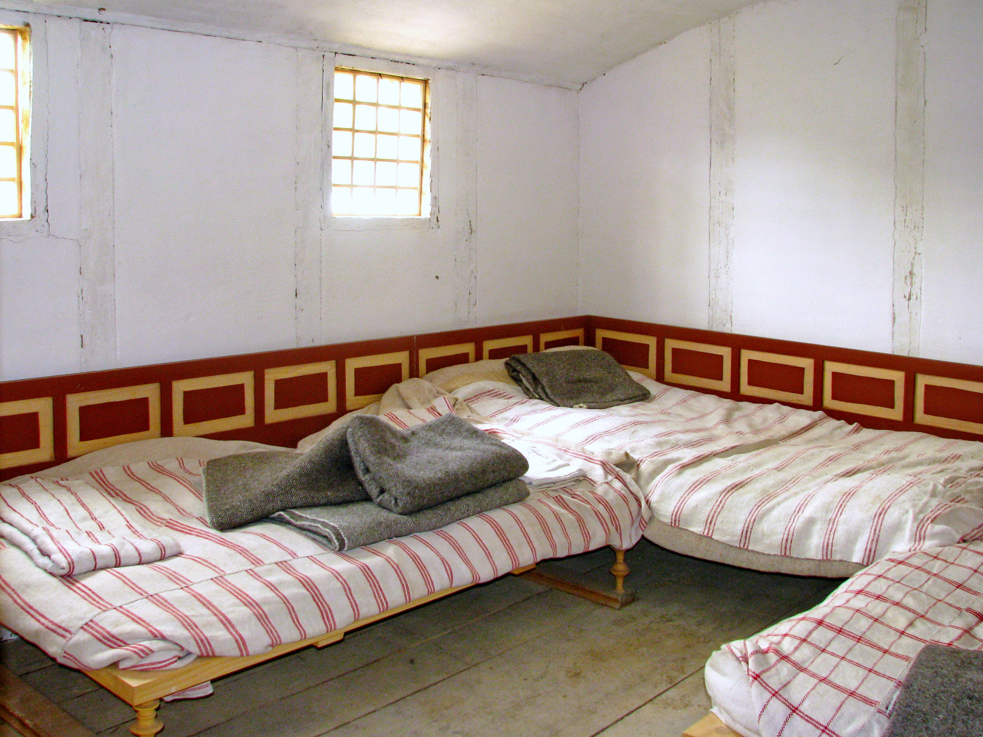 Inneneinrichtung eines Contubernium auf dem Legionärspfad in Windisch (Schweiz)